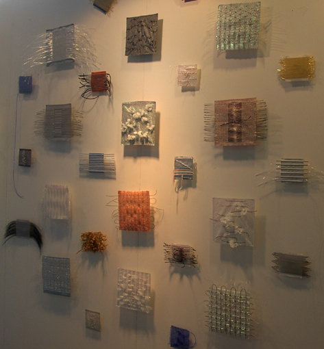 Textilt konsthantverk & Design 2005. Textil utsmyckning